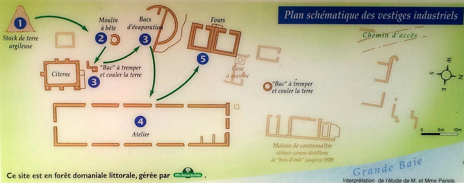 Plan schématiques des vestiges de la Poterie de Terre-de-Bas